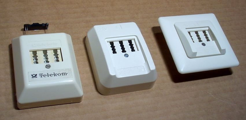 1. TAE (Deutsche Telekom AG): Modell von 1991 (mit separatem passiven Prüfabschluss) und Modell von 2006 aufputz + unterputz.